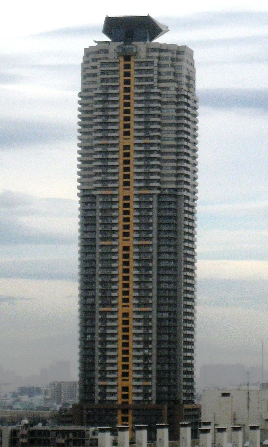 川口エルザタワー "Kawaguchi Elsa Tower", a high-rise apartment in Saitama, Japan